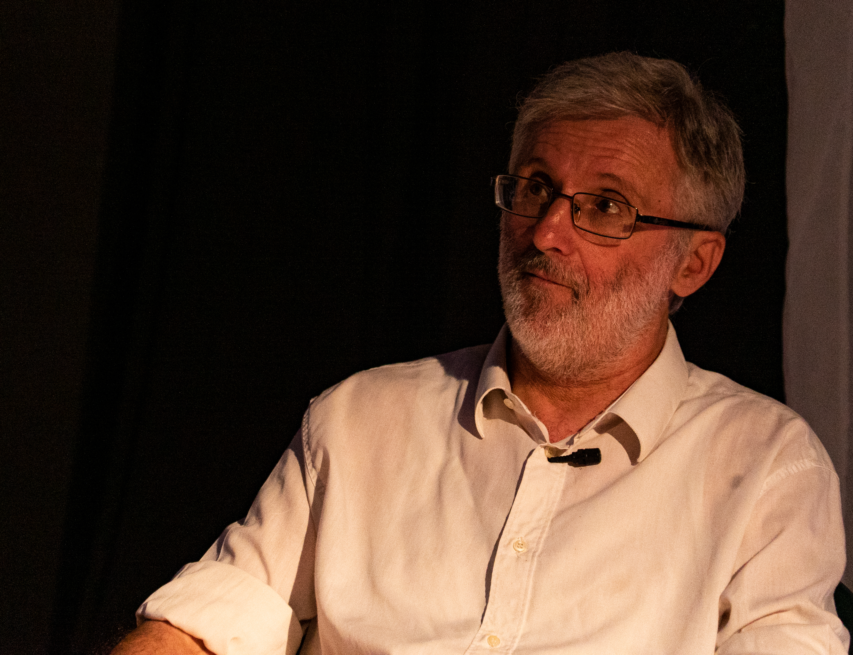 Regista del Teatro dell'Aleph